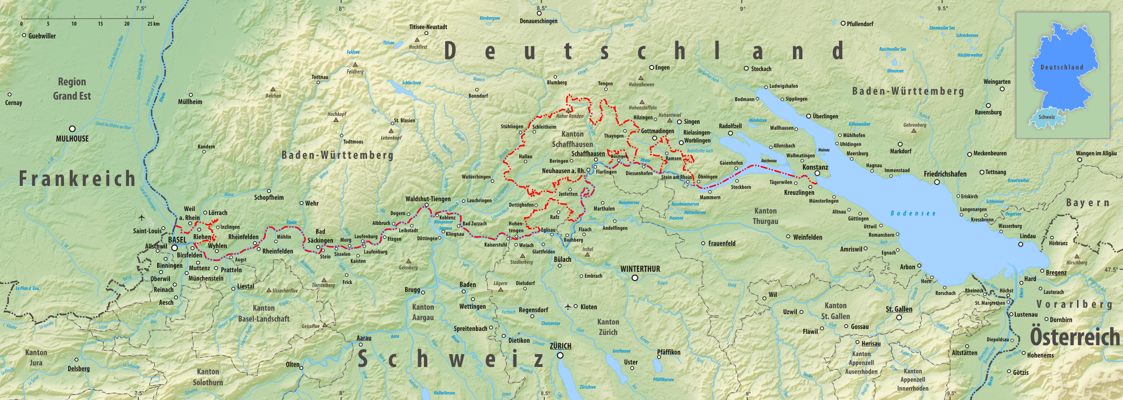 Reliefkarte des Grenzverlaufes zwischen der Schweiz und Deutschland Topographischer Hintergrund: NASA Shuttle Radar Topography Mission (public domain). SRTM3 v.2.